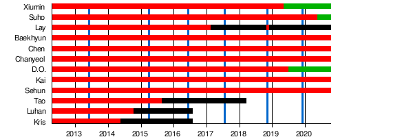 Активност чланова групе